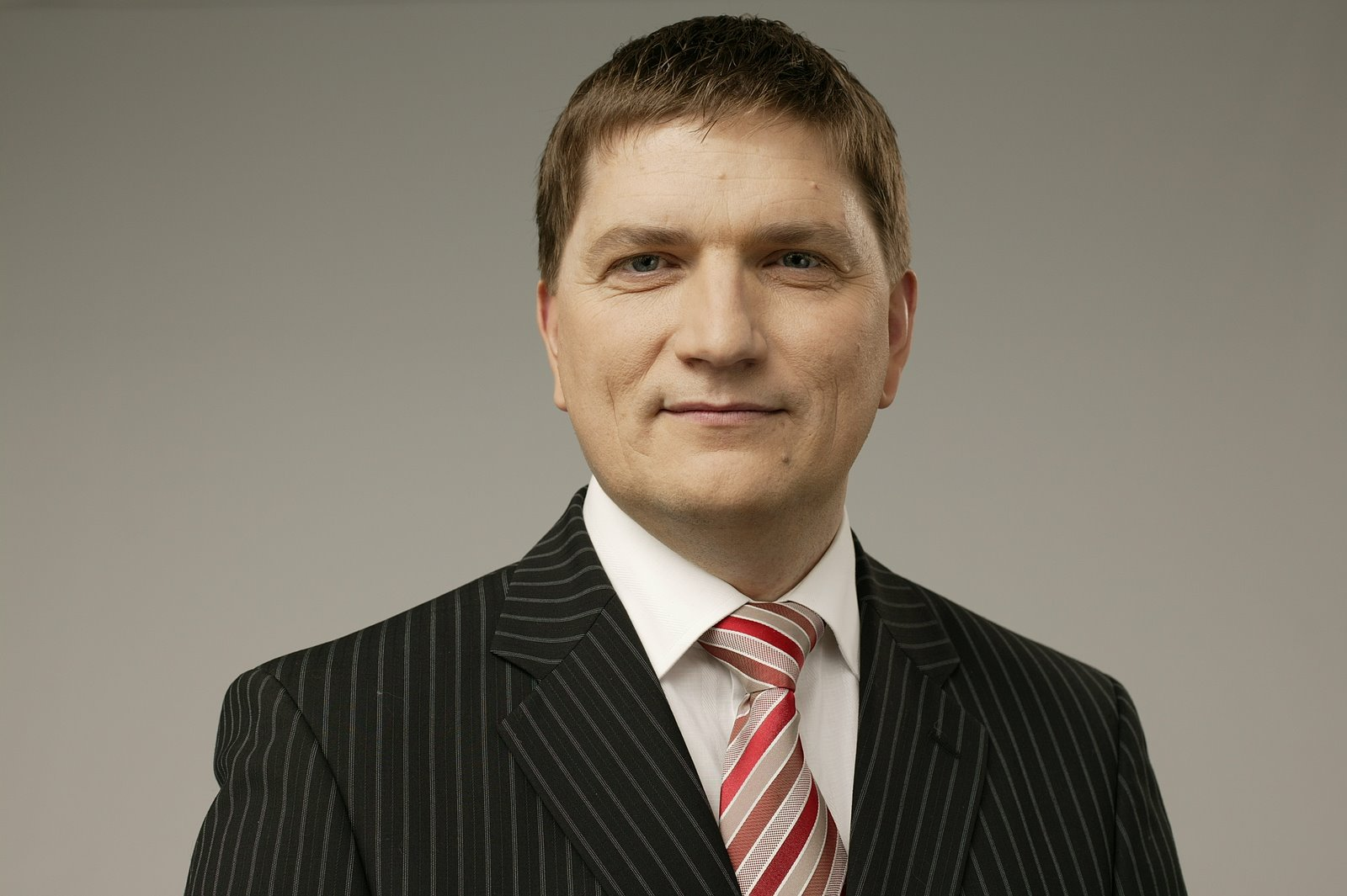 Rein Järvelill